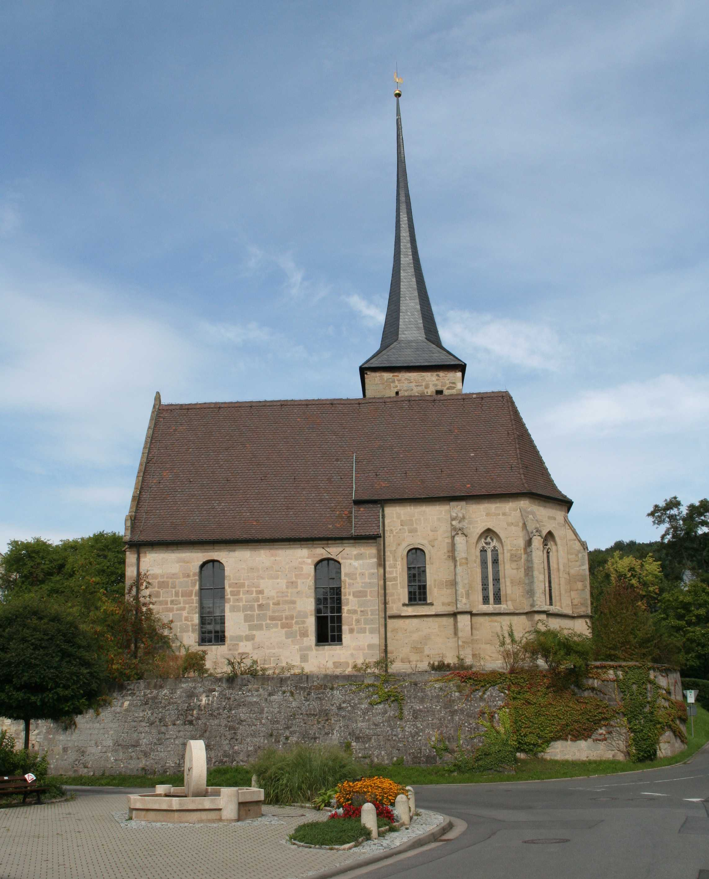 Ev. Kirche Coburg-Seidmannsdorf